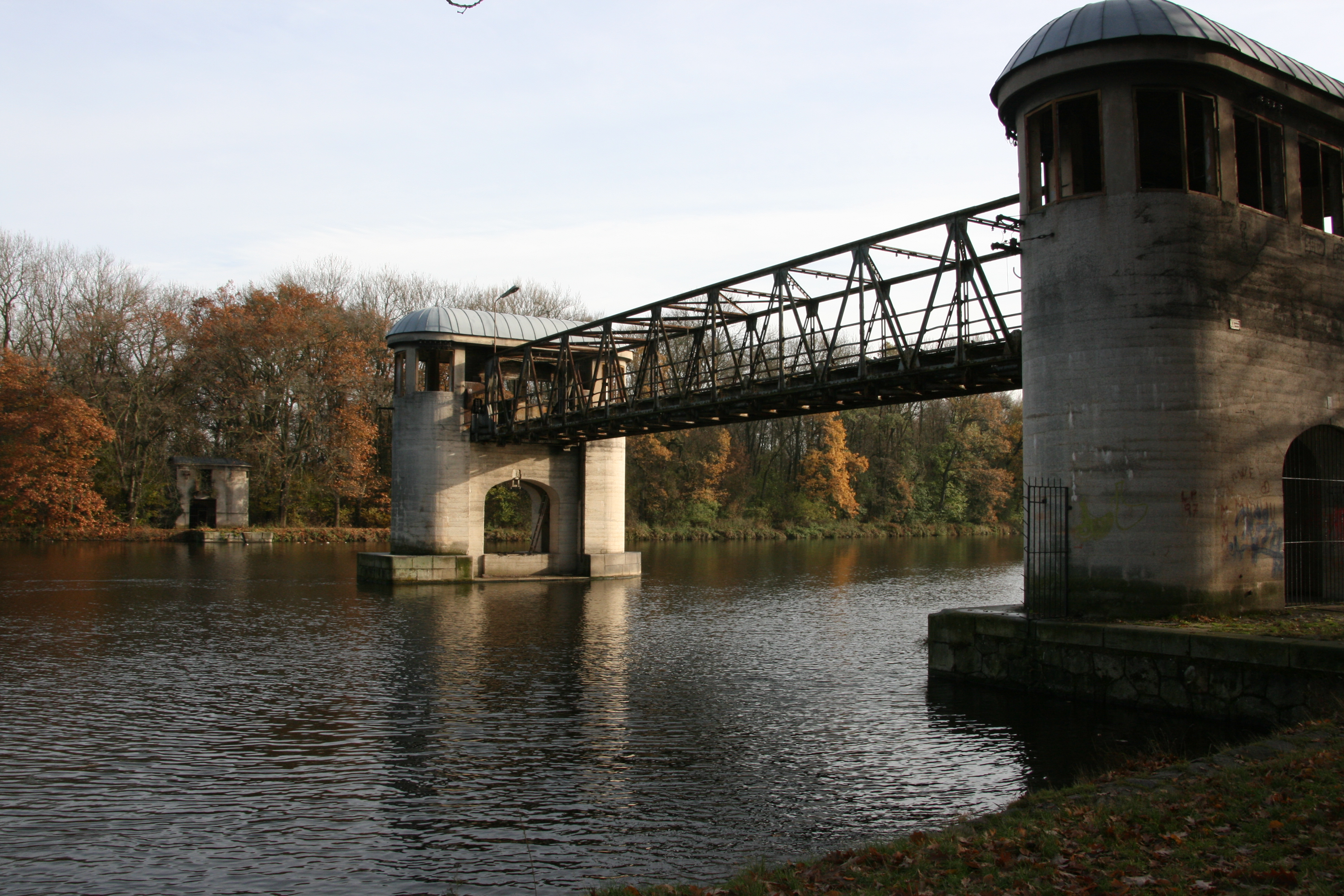 Starý jez v Obříství